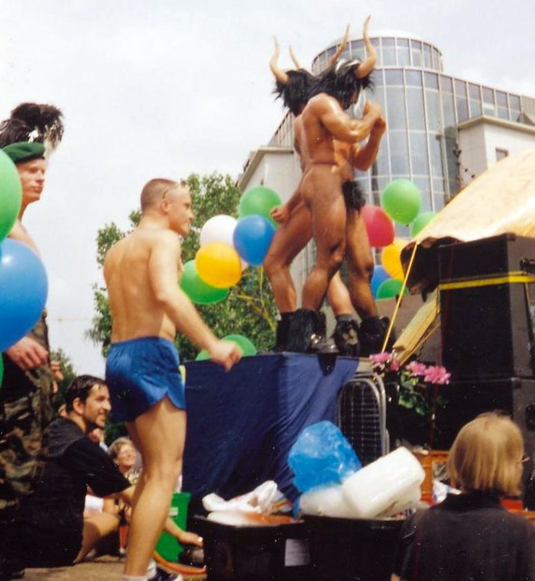 Christopher Street Day Berlin